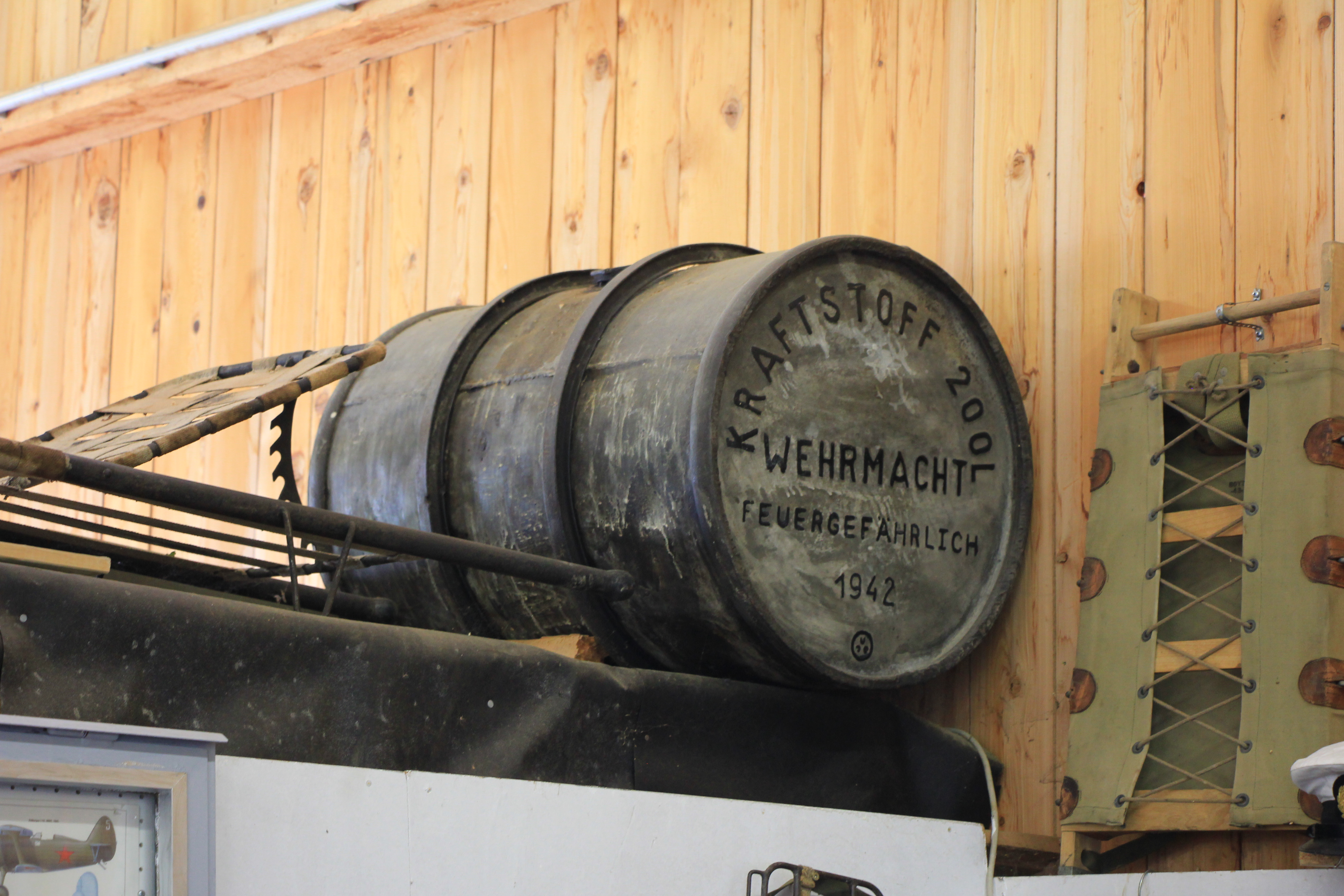 Dorfmuseum Maiersdorf in Niederösterreich